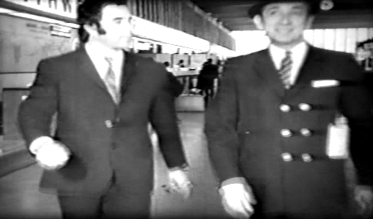 usaasdfghj